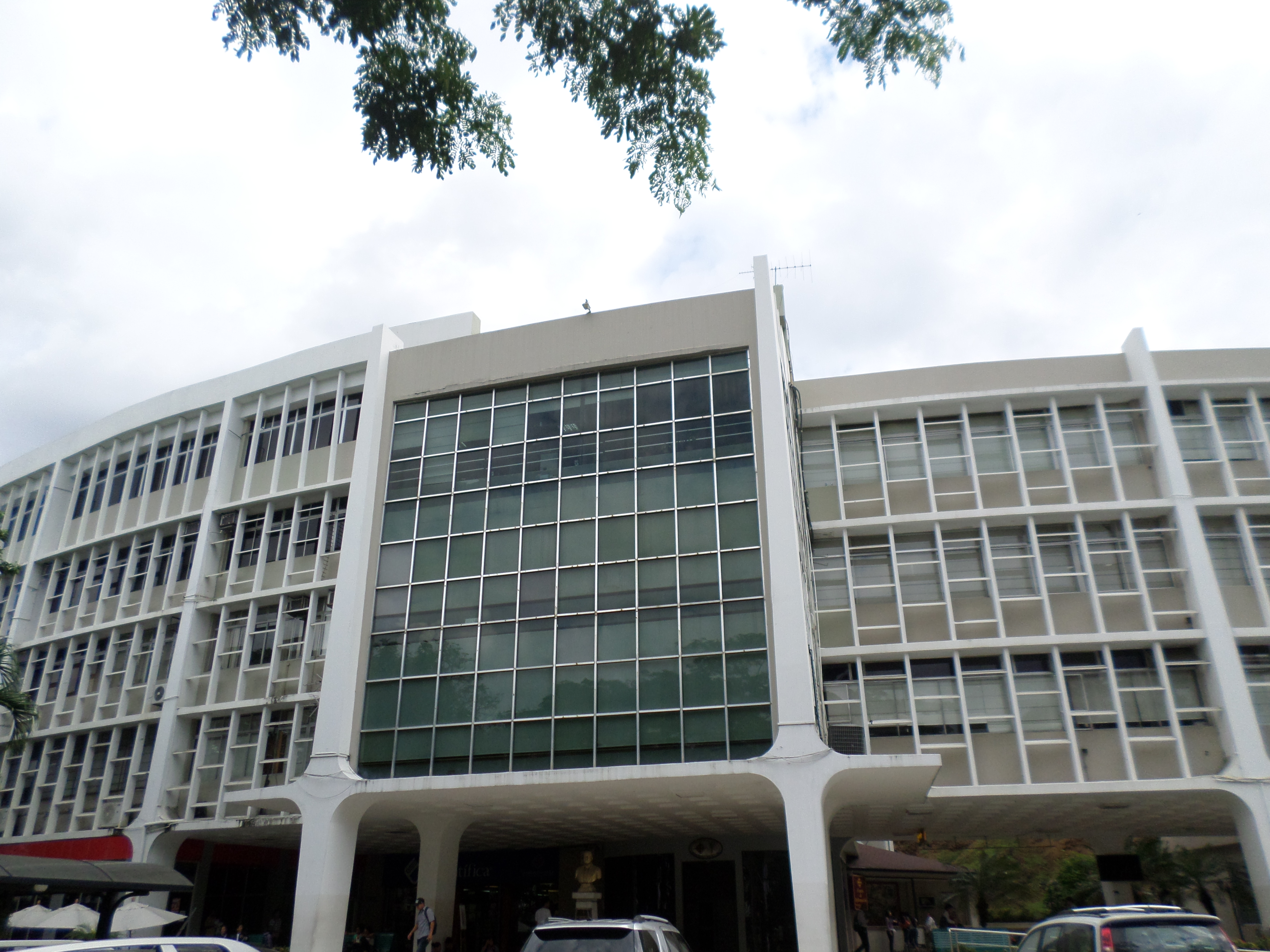 edificio principal